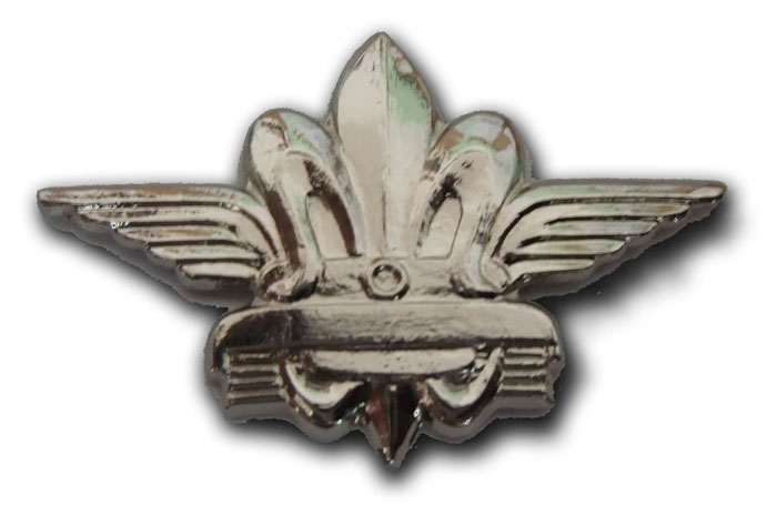 סיכת מו"ס קטגוריה:ויקיפדיה - סמלי צה"ל